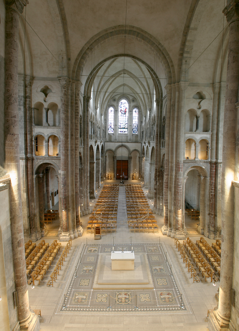 Groß St. Martin, Köln. Blick aus der Ostkonche durch den Chor ins Hauptschiff nach Westen